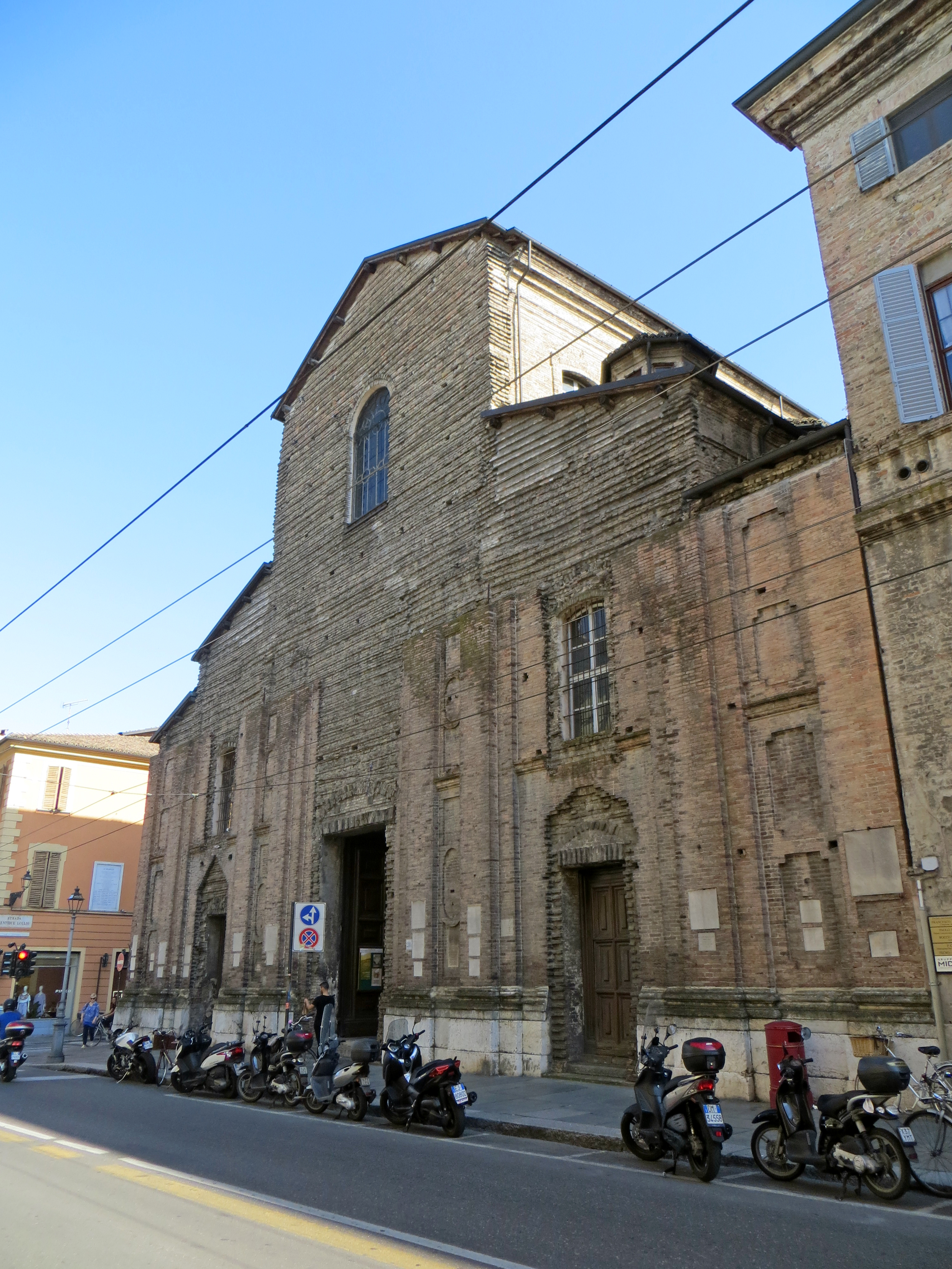 Chiesa di Santa Cristina (Parma) - facciata